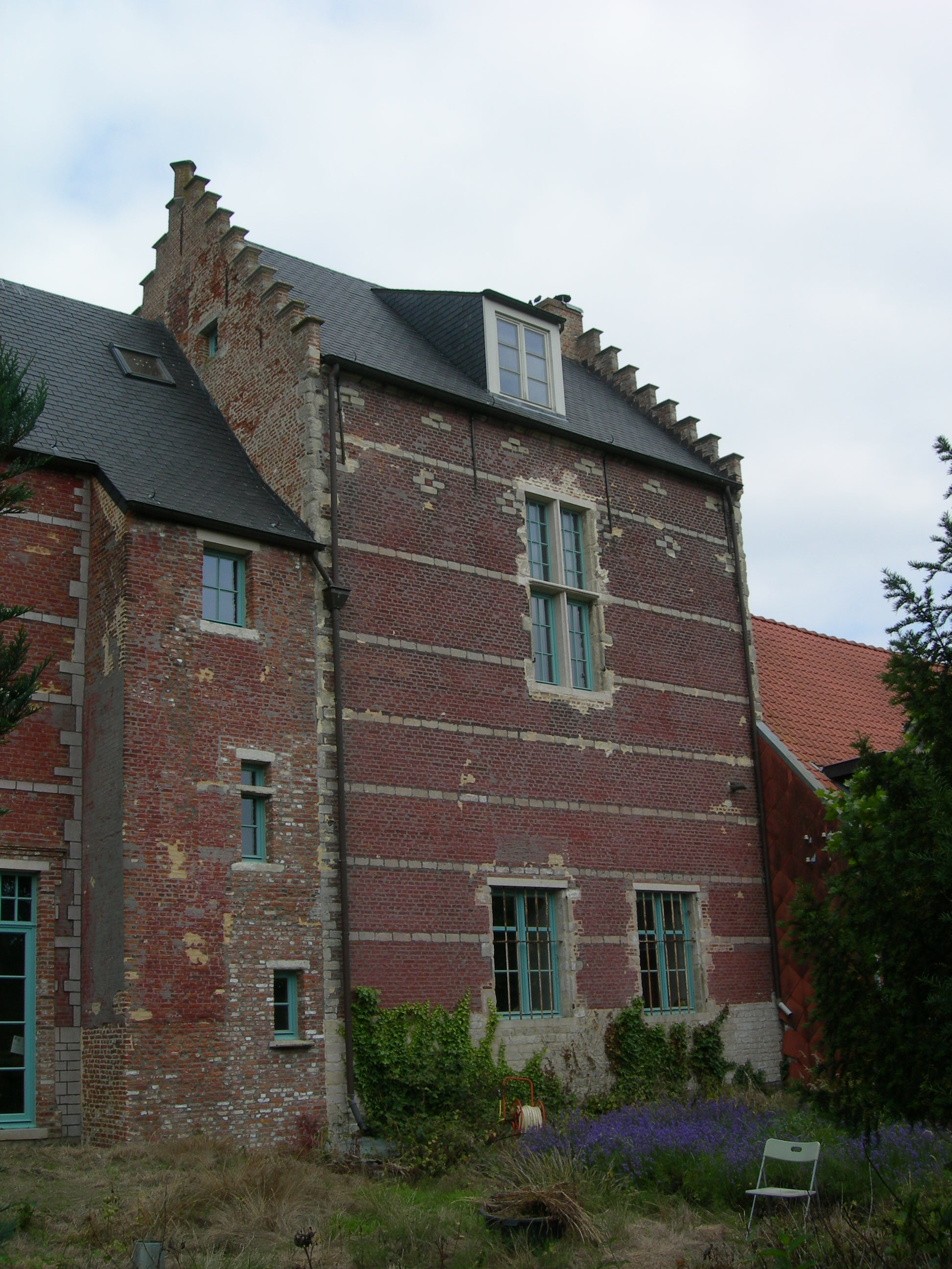 De zijgevel van het Jachtslot Berentrode in Bonheiden, toestand in de zomer van 2013.